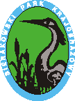 Logo Sierakowskiego Parku Krajobrazowego.